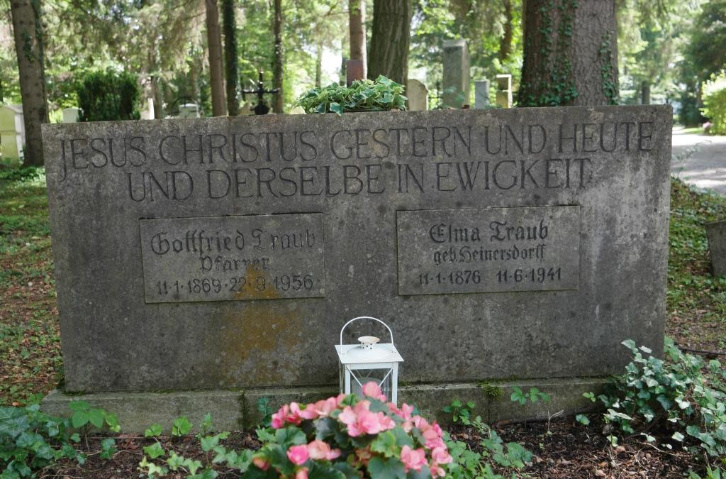 Grab des Theologen und Politikers Gottfried Traub, 1869-1956, auf dem Waldfriedhof in München-Solln